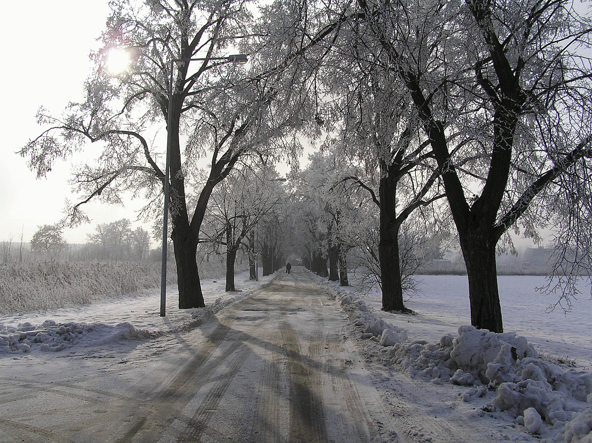 Aleja Lipowa zabytkowa na Morach w dzielnicy Warszawa-Bemowo